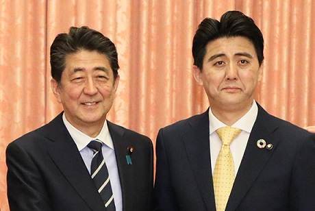 ビスケッティの佐竹正史メンバー（右）と安倍晋三内閣総理大臣（左）。